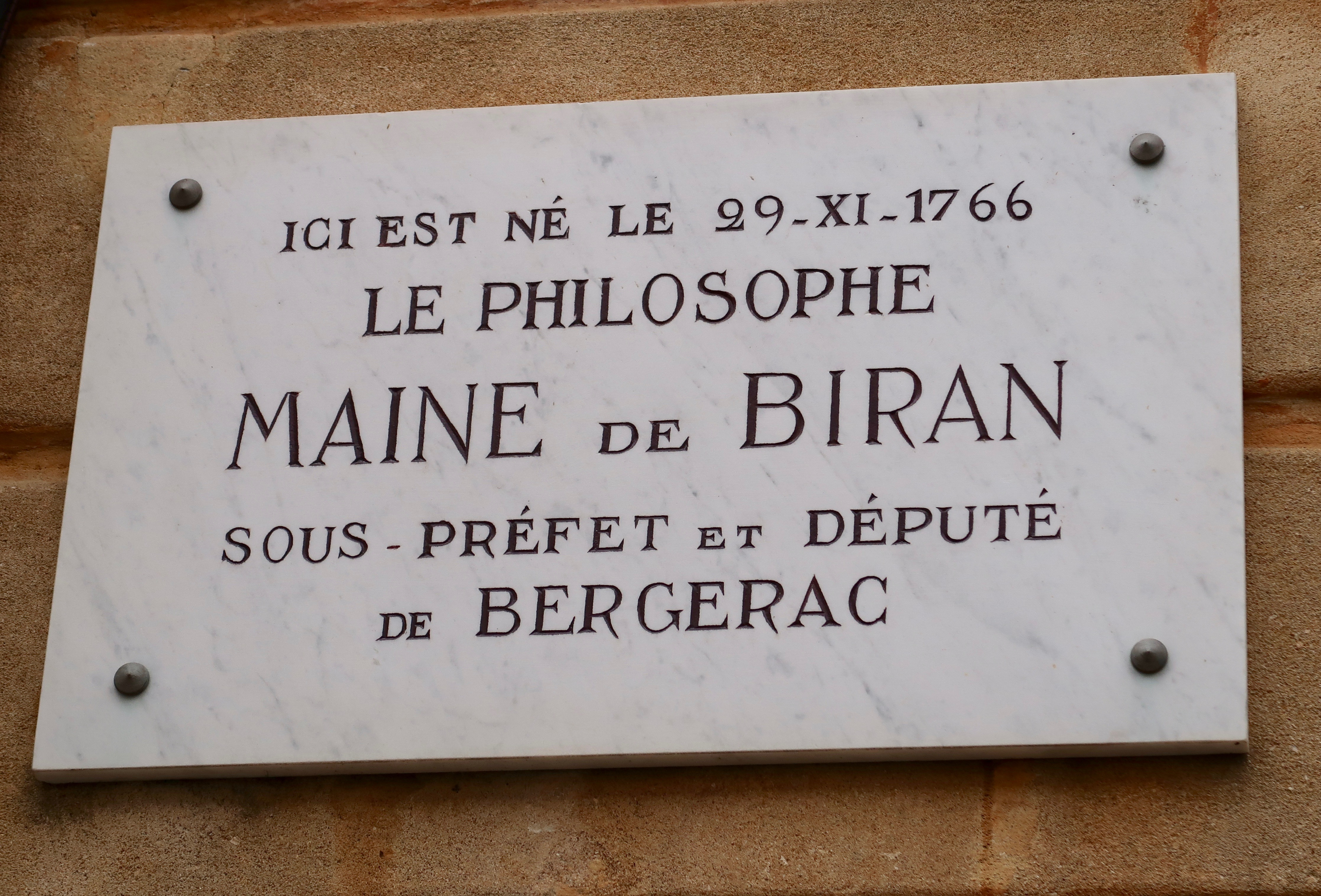 Plaque en hommage au philosophe Maine de Biran, 39 rue Sainte-Catherine, à Bergerac (Dordogne), où il est né en 1766.